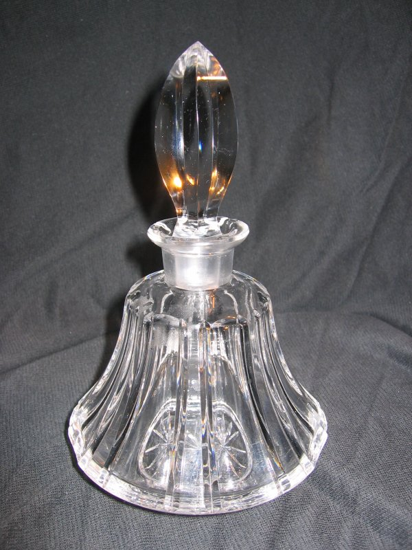 Karaffe aus Bleikristall *Quelle: fotografiert am 25.09.2004 *Fotograf: Pismire *Lizenzstatus